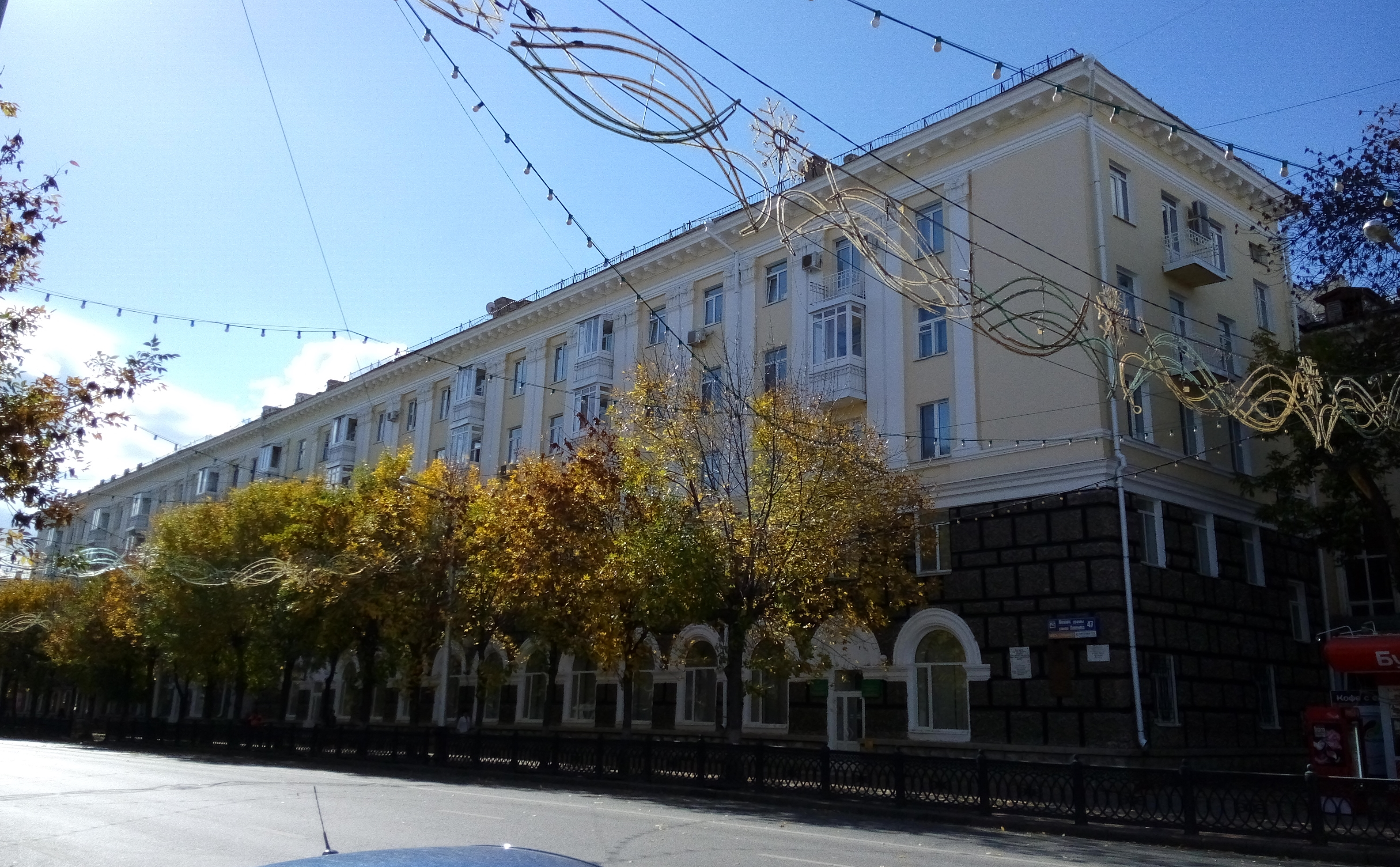 Дом, в котором жил башкирский писатель и ученый-лингвист Киекбаев Д.Г.: улица Ленина, 43-47, Уфа, Башкортостан